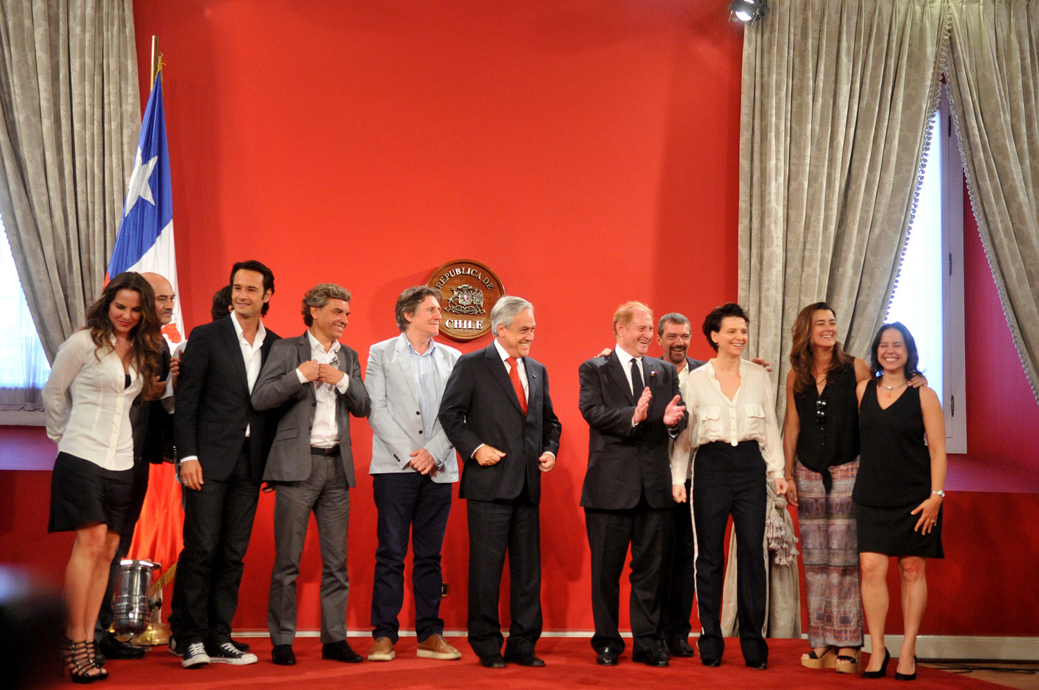 Lanzamiento Película "Los 33"